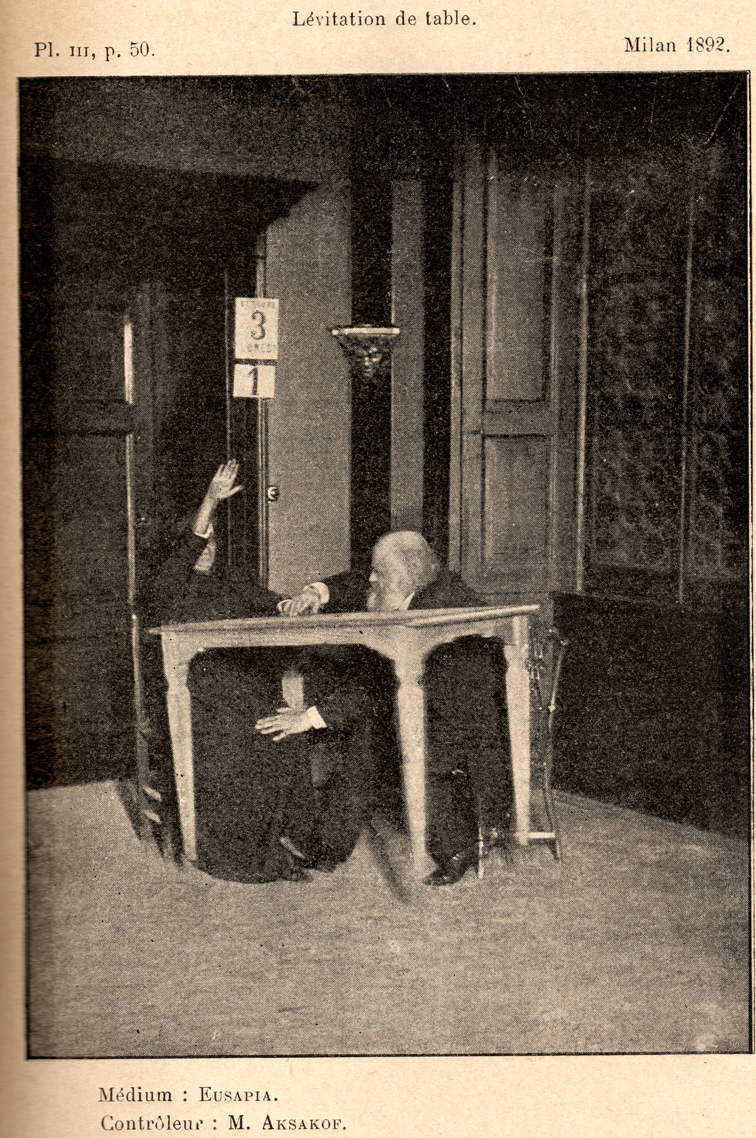 Le professeur Aksakof réalisant une expérience d'observation sur la médium Eusapia, à Milan, en 1892